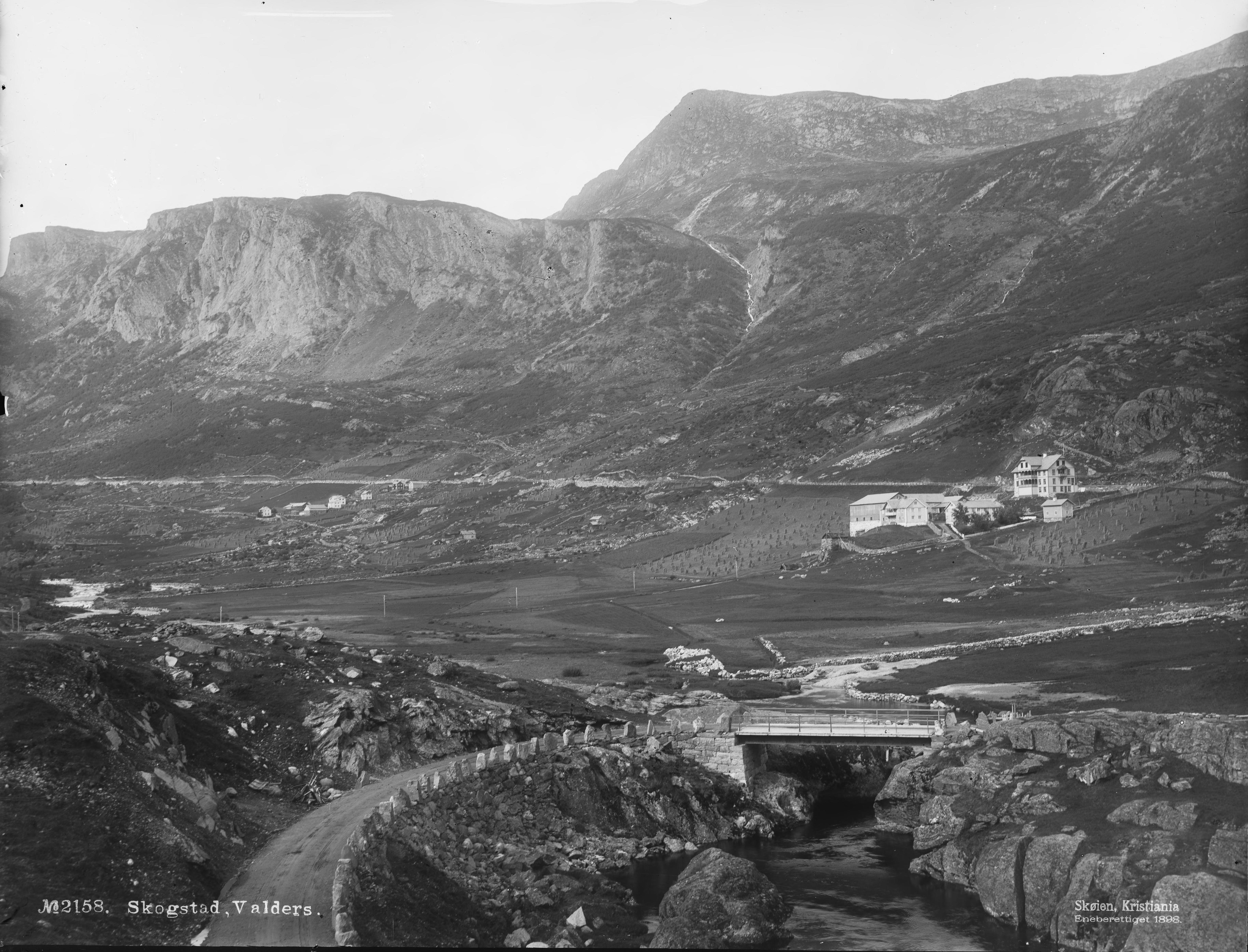 Påskrift negativ: No2158. Skogstad, Valders. Skøien Kristiania Eneberettiget 1898 Påskrift negativ: 149 Vang [Riksantikvaren] Påskrift konvolutt: B-149 Vang. Skogstad hotel & skysstasjon [Riksantikvaren] [Negativet er eksponert med speilvendt resultat. Rettet opp.] Sted: Skogstad Kommune: Vang Fylke: Oppland Tagger: landskap hotell Skogstad hotel & skysstasjon